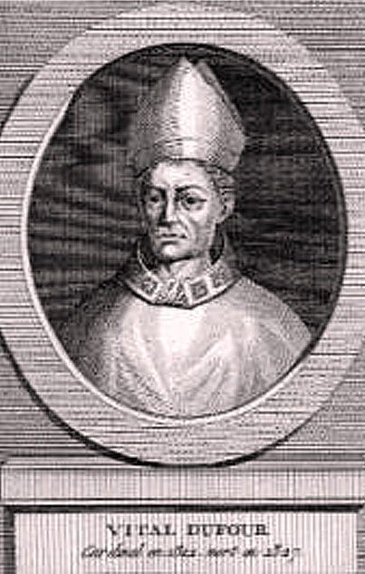 Cardinal Vital Dufour